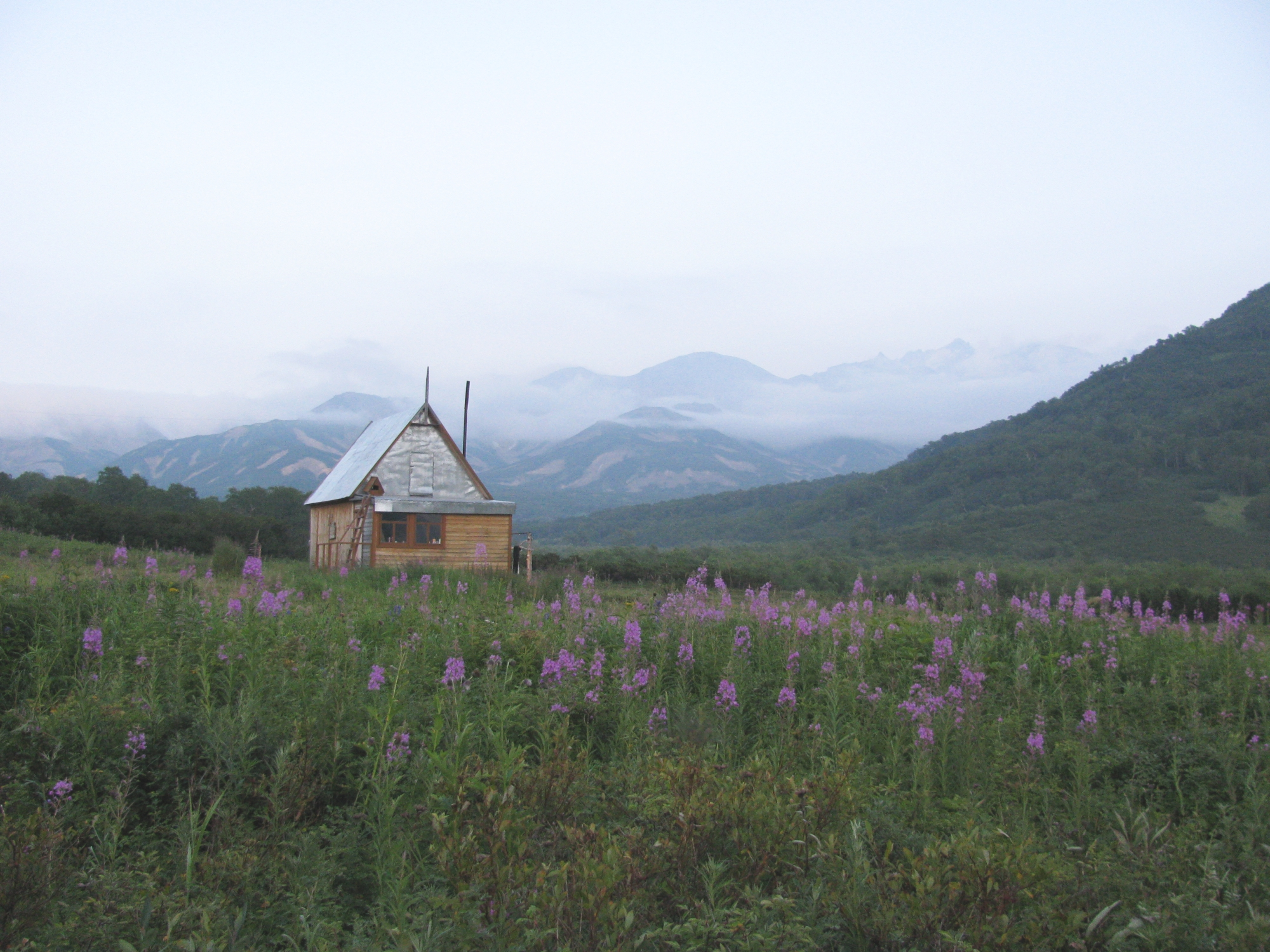 Семеновский кордон в Налычевской долине на Камчатке, фото 2009 года